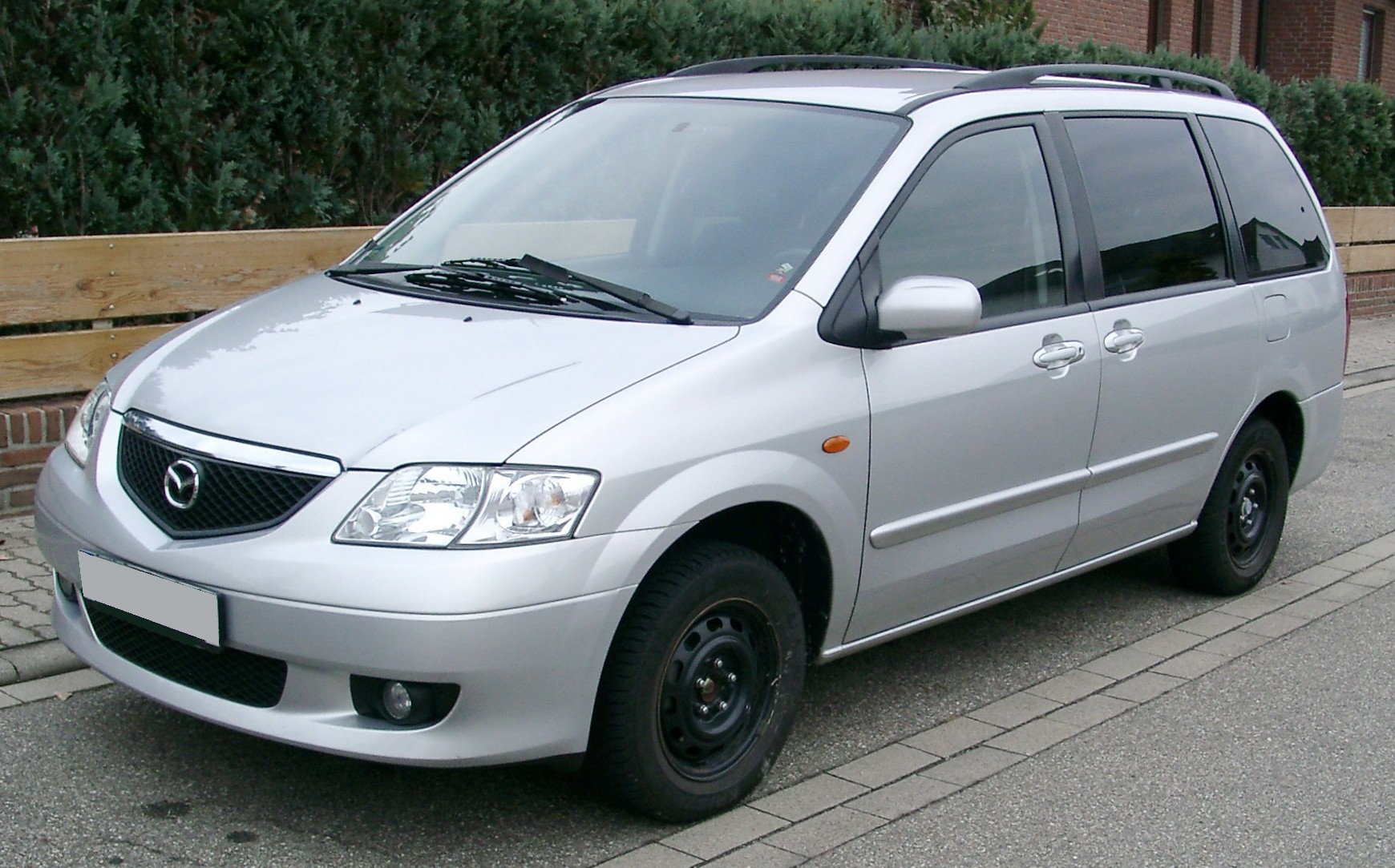 Mazda MPV